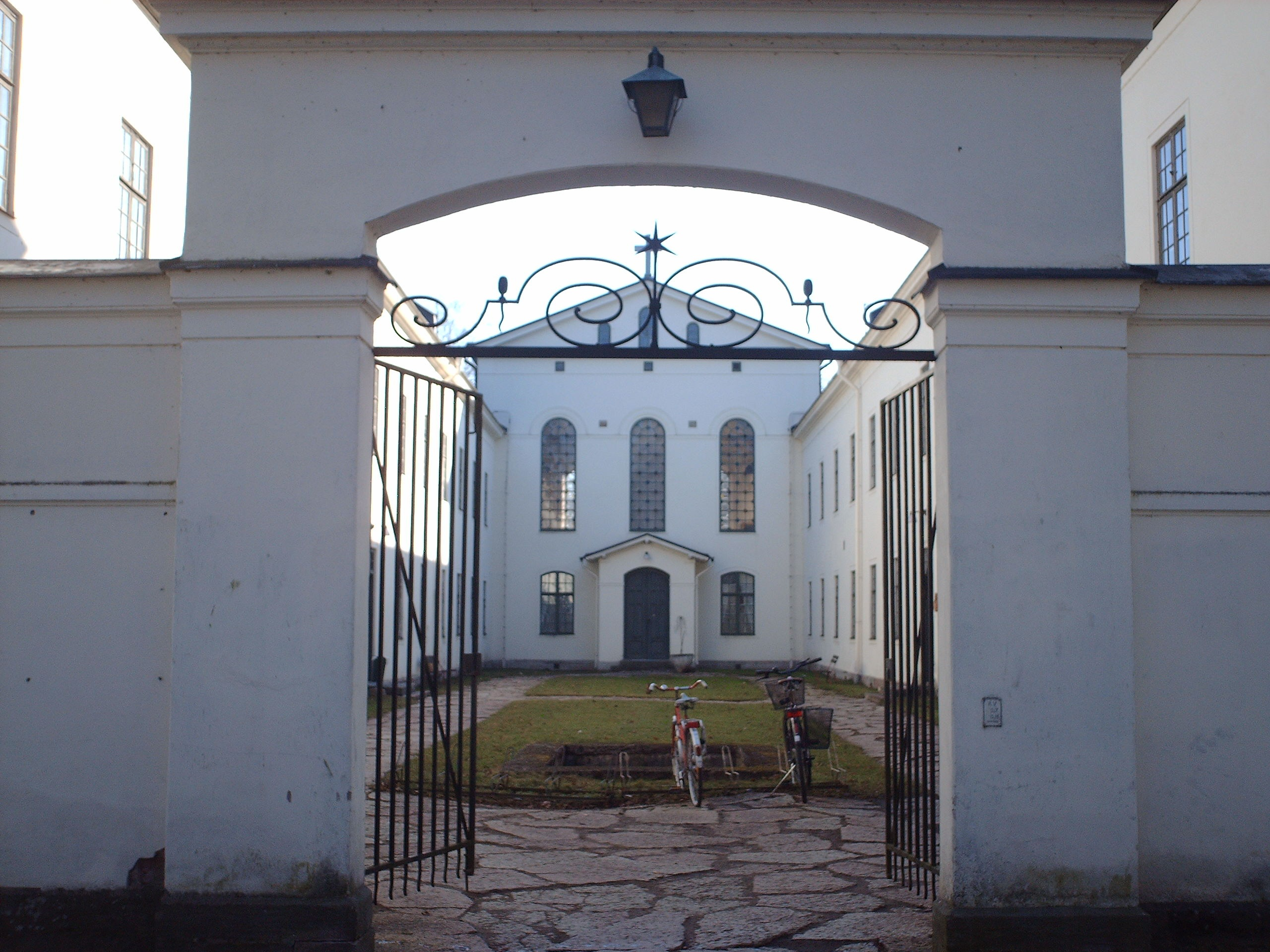 Hospitalskyrkan, Vadstena, Sweden.